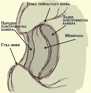 ІЧ-чутливий орган в ямкоголових змій